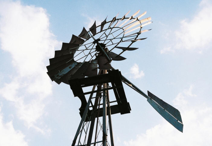 molino de Marchigüe